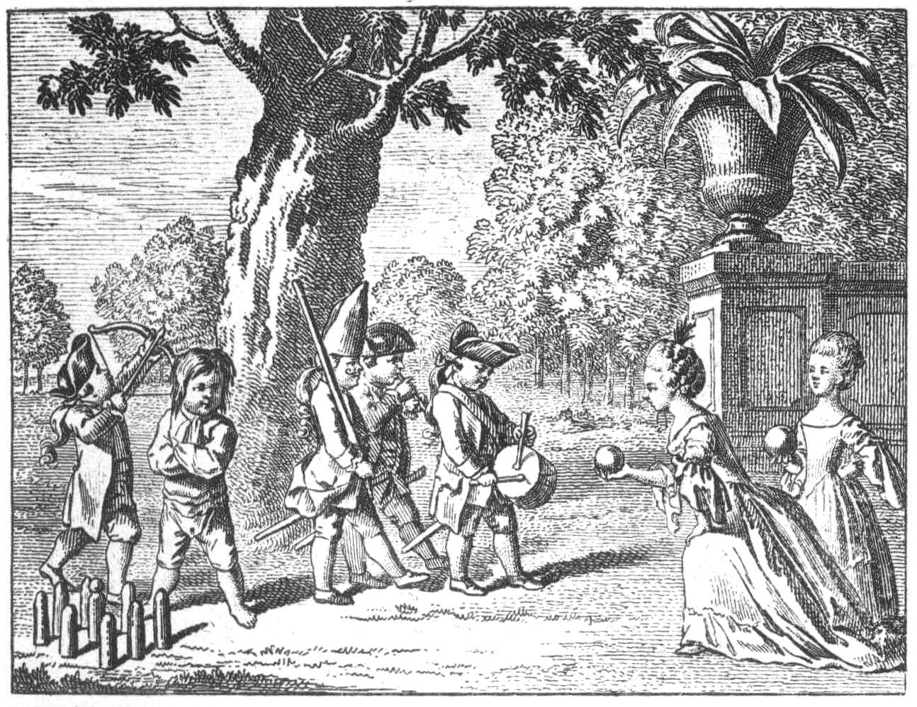 Vergnügungen der Kinder. a) Soldatenspiele. Der Bogenschütze. Die Kegelschieberinnen, der Aufsetzer. (Beschreibung lt. Quelle)